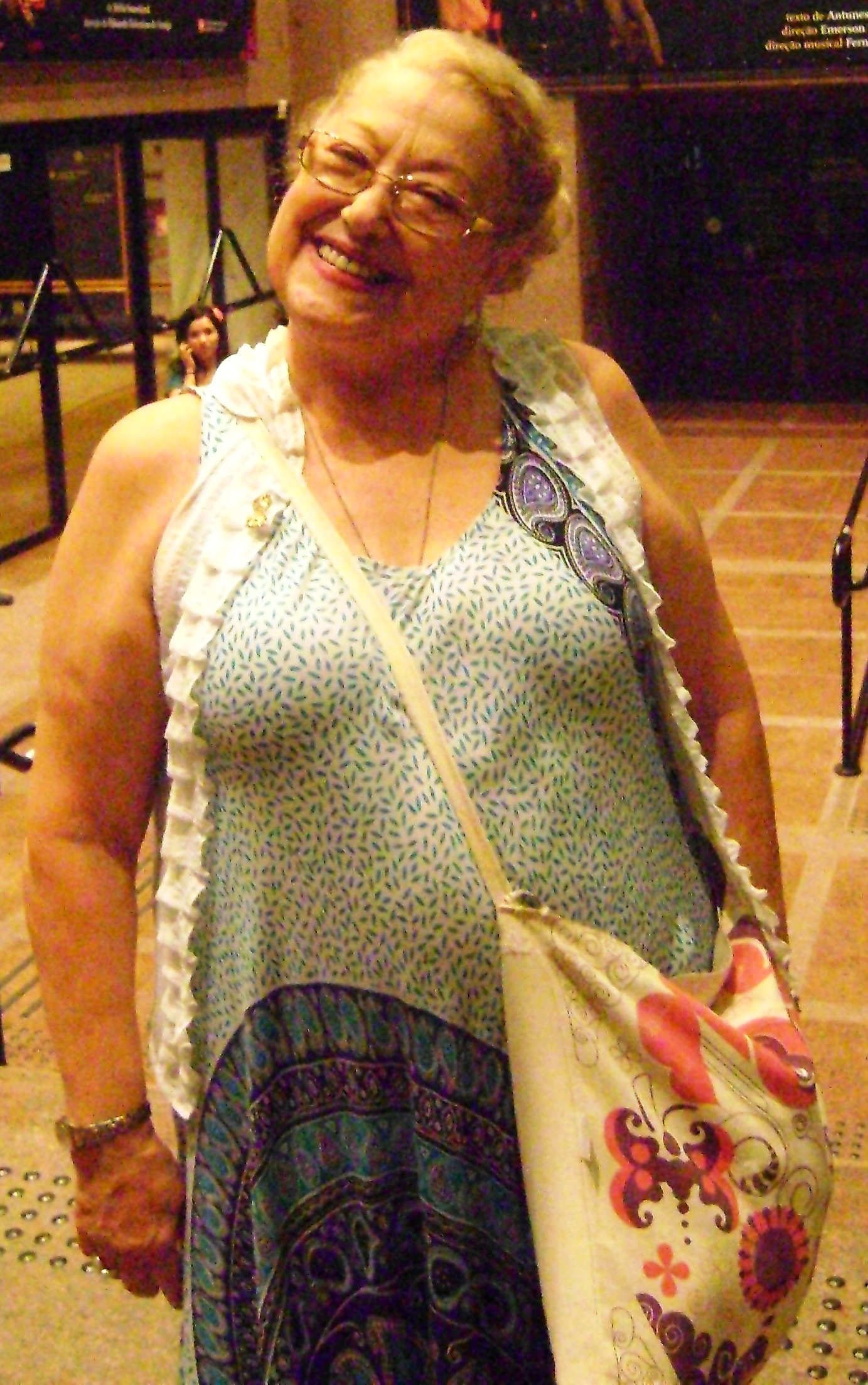 Suely Franco, atriz brasileira, após a apresentação da peça "Recordar é Viver", em São Paulo.